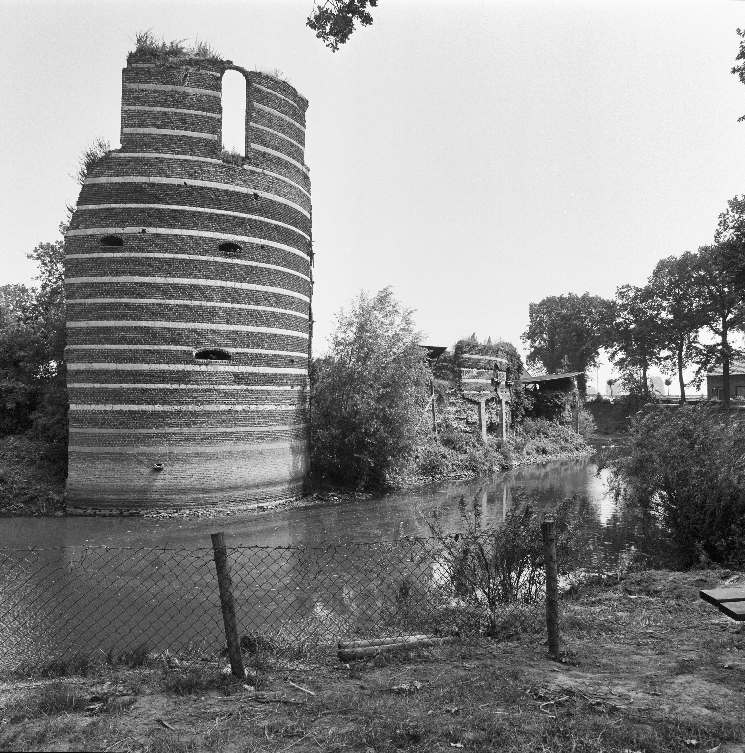 KASTEEL RUINE: Exterieur